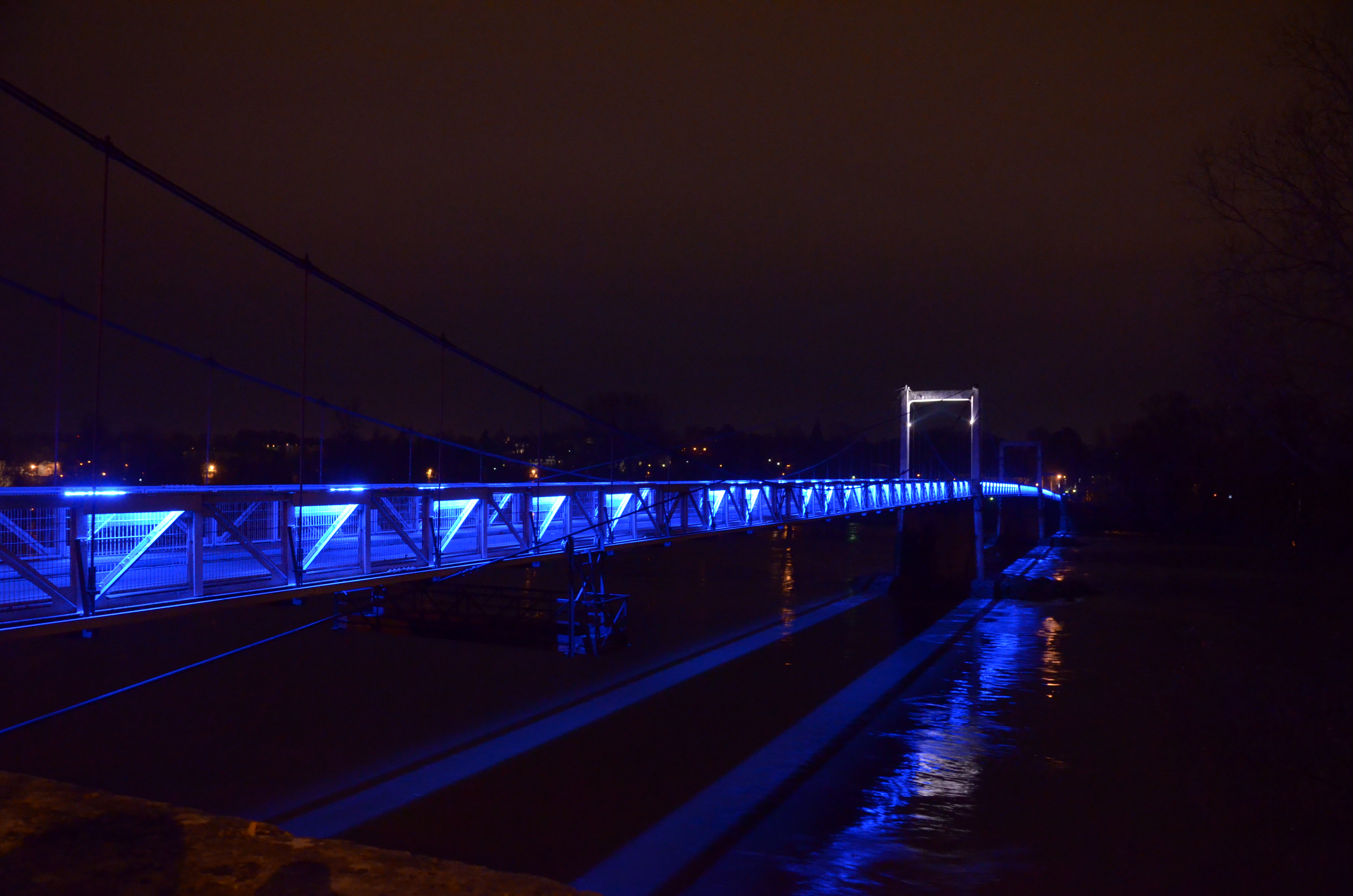 Vue de nuit depuis la rive Sud de la Loire.